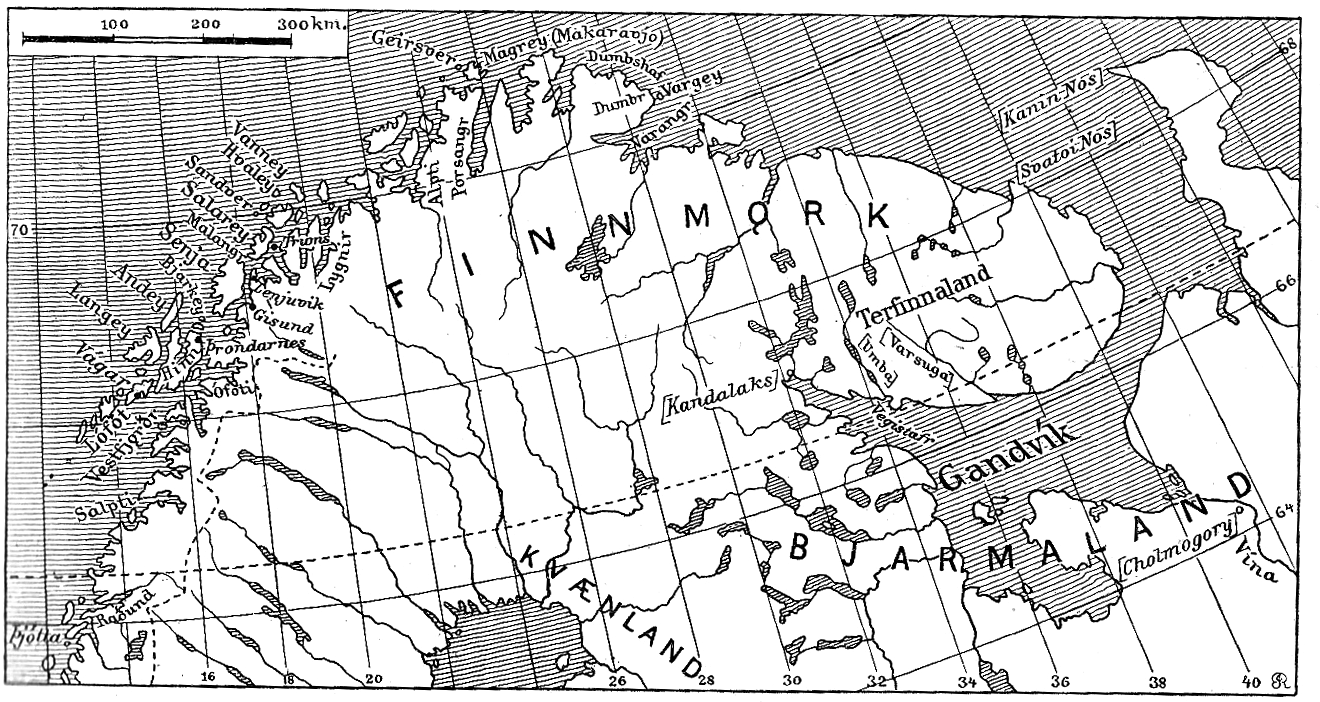 Boka tar for seg år 800-1030. Grensene forandret seg noe, men var stort sett de samme i hele perioden.